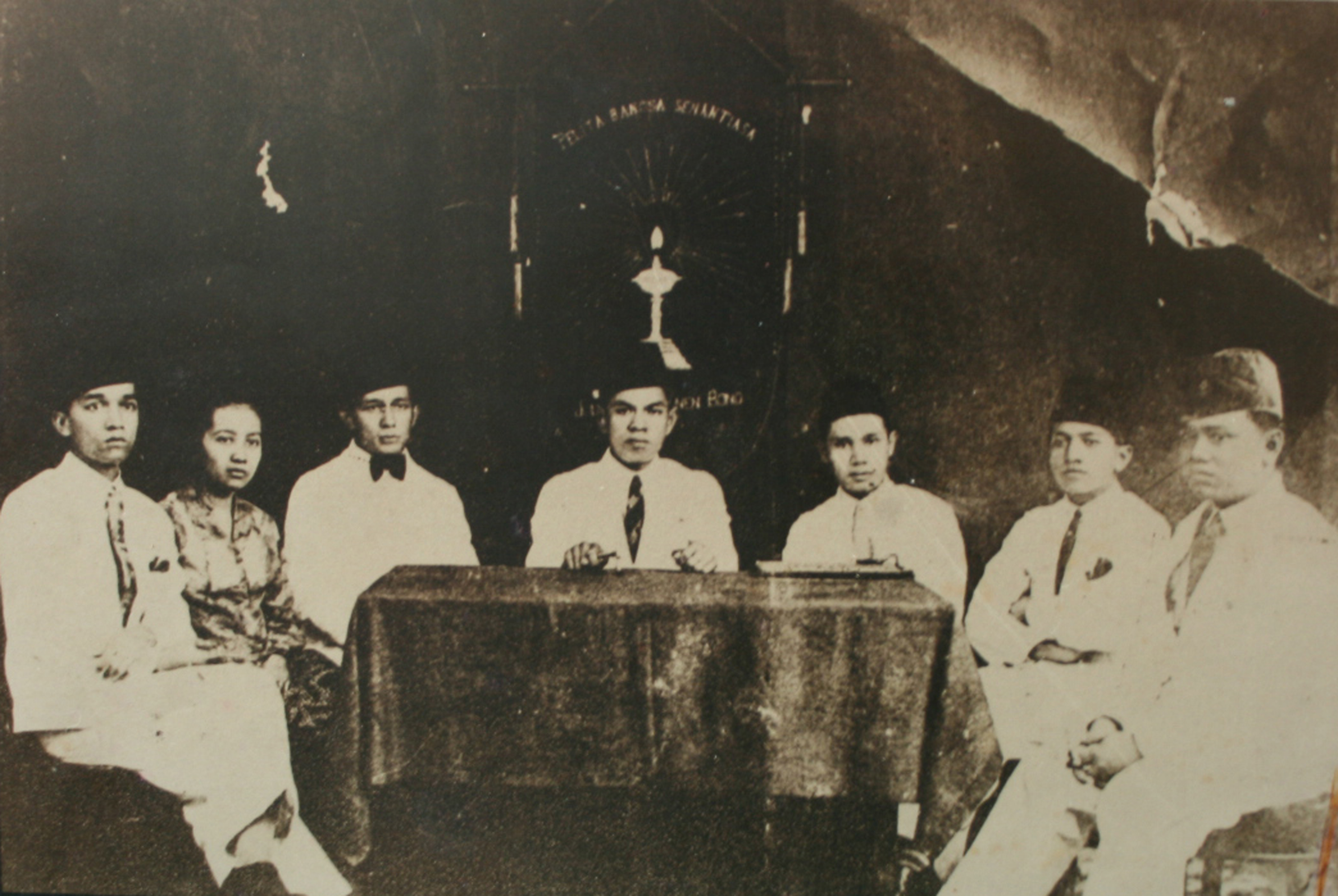 Organisasi Jong Sumatranen Bond